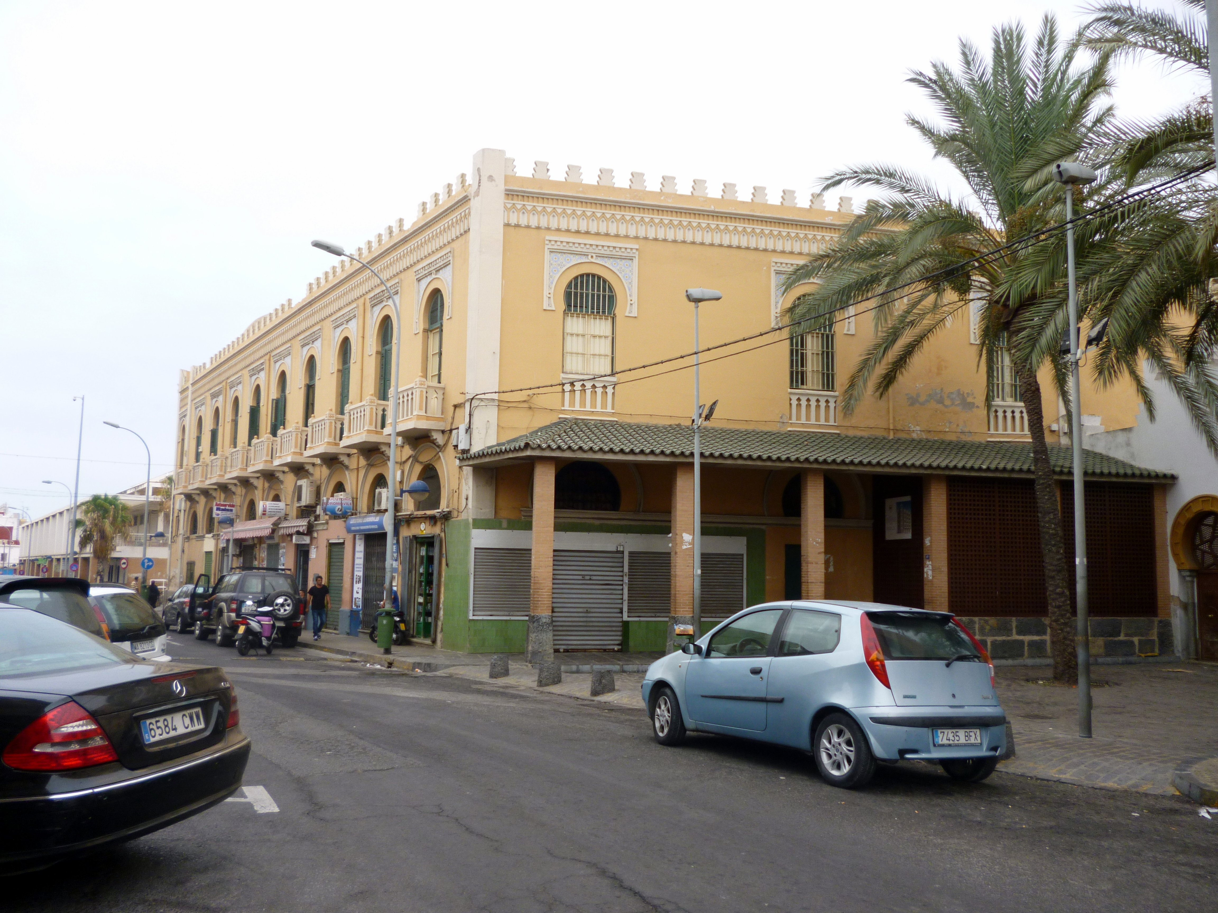 Mezquita Central de Melilla